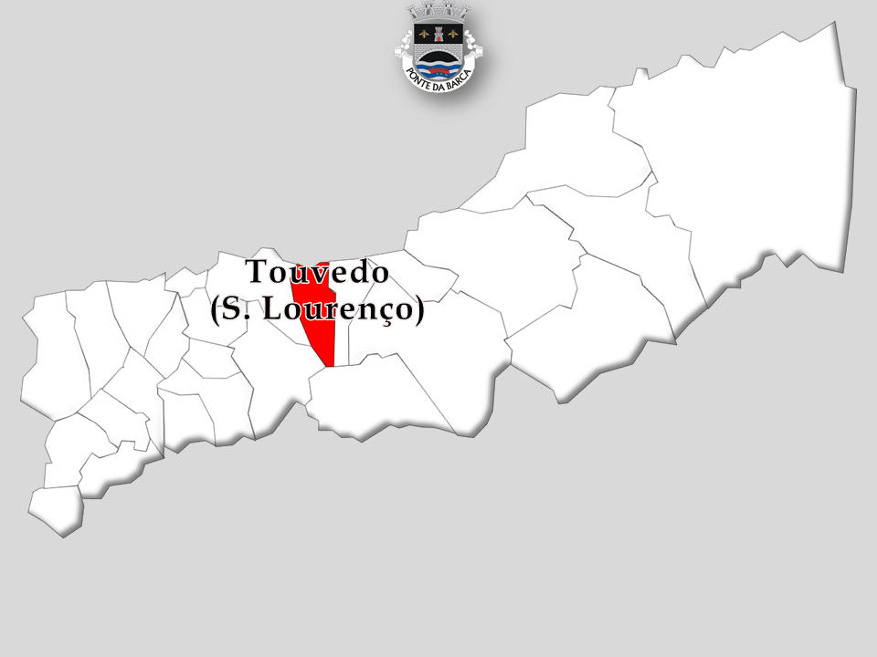 Censos 1864/2011